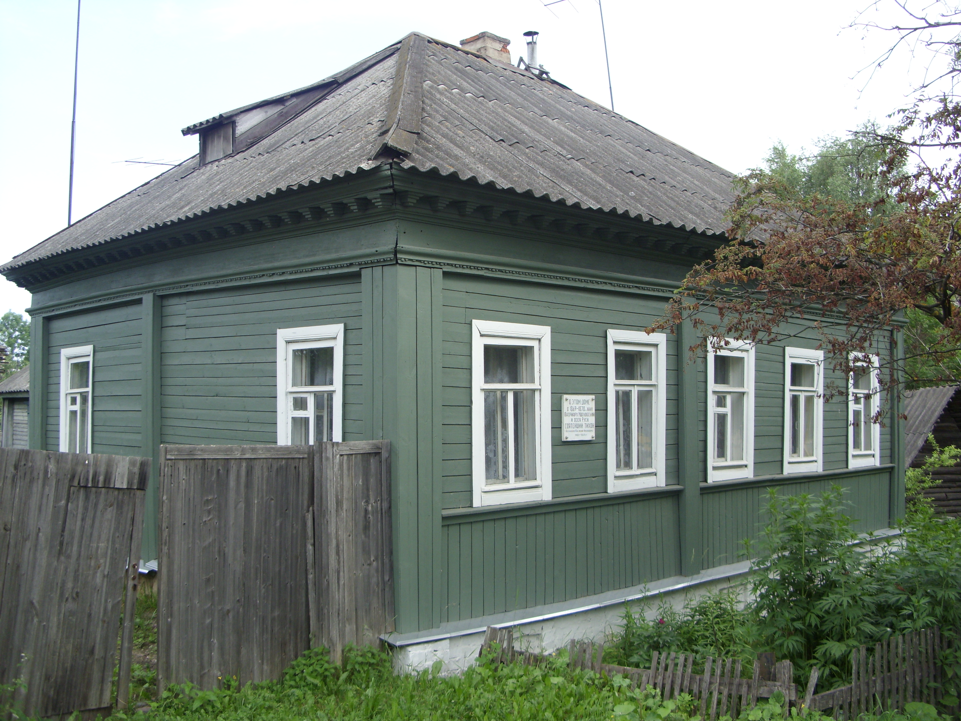 Toropets. Dom, gde zhil Patriarch Tikhon